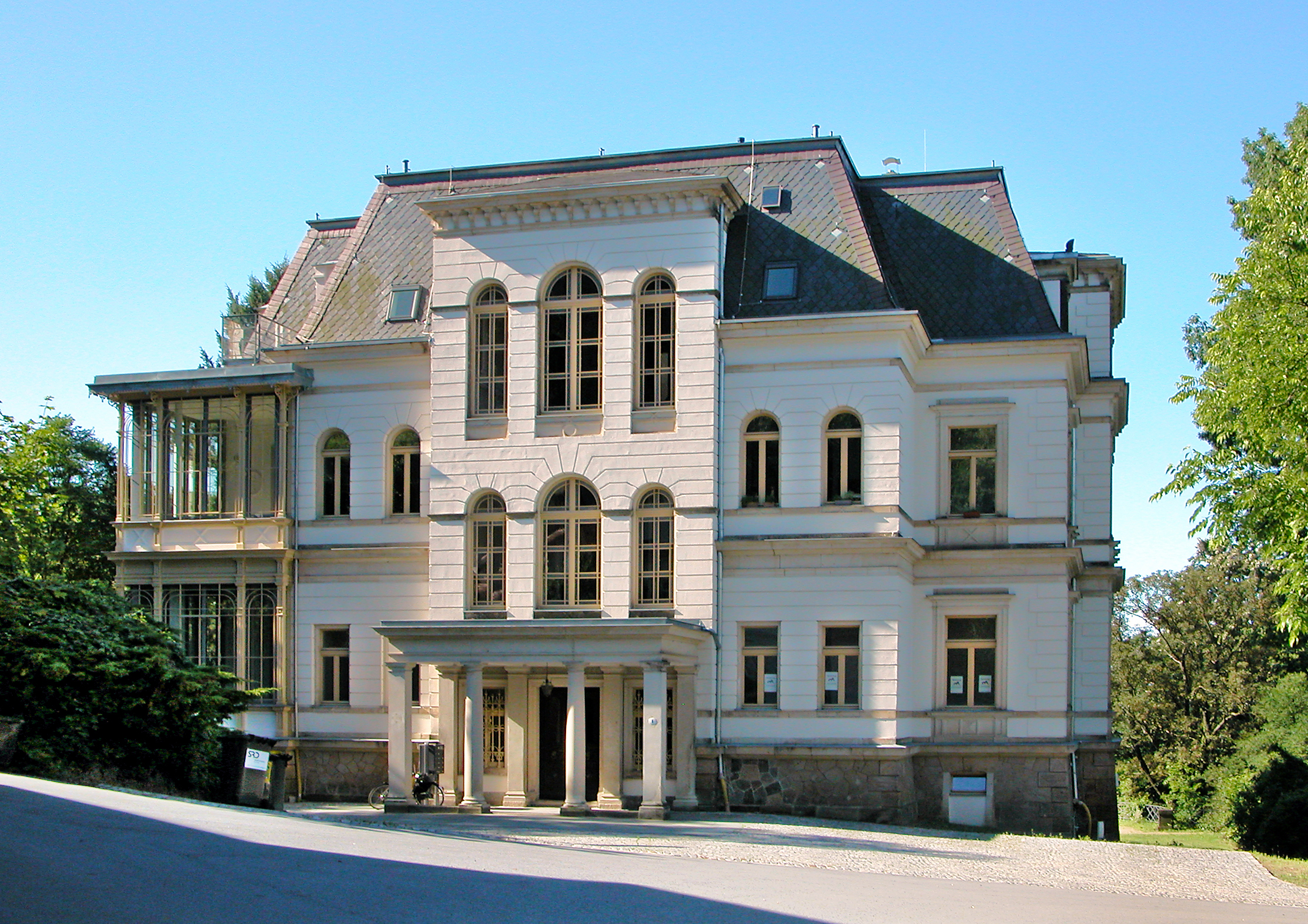 09.07.2012 01326 Dresden-Wachwitz: Königliche Villa, Wachwitzer Weinberg 1 (GMP 51.044543,13.827927). 1892/93 "Königliche Villa" im Stil des Historismus (Neorenaissance) nach Plänen des Baumeisters Wilhelm Teichgräber errichtet. Der letzte sächsische König, Friedrich August III. lebte hier bis zum Regierungsantritt 1904. Bis 1997 wurde sie als Institut für Lehrerbildung genutzt. [DSCNn4267.TIF]20120709010DR.JPG(c)Blobelt